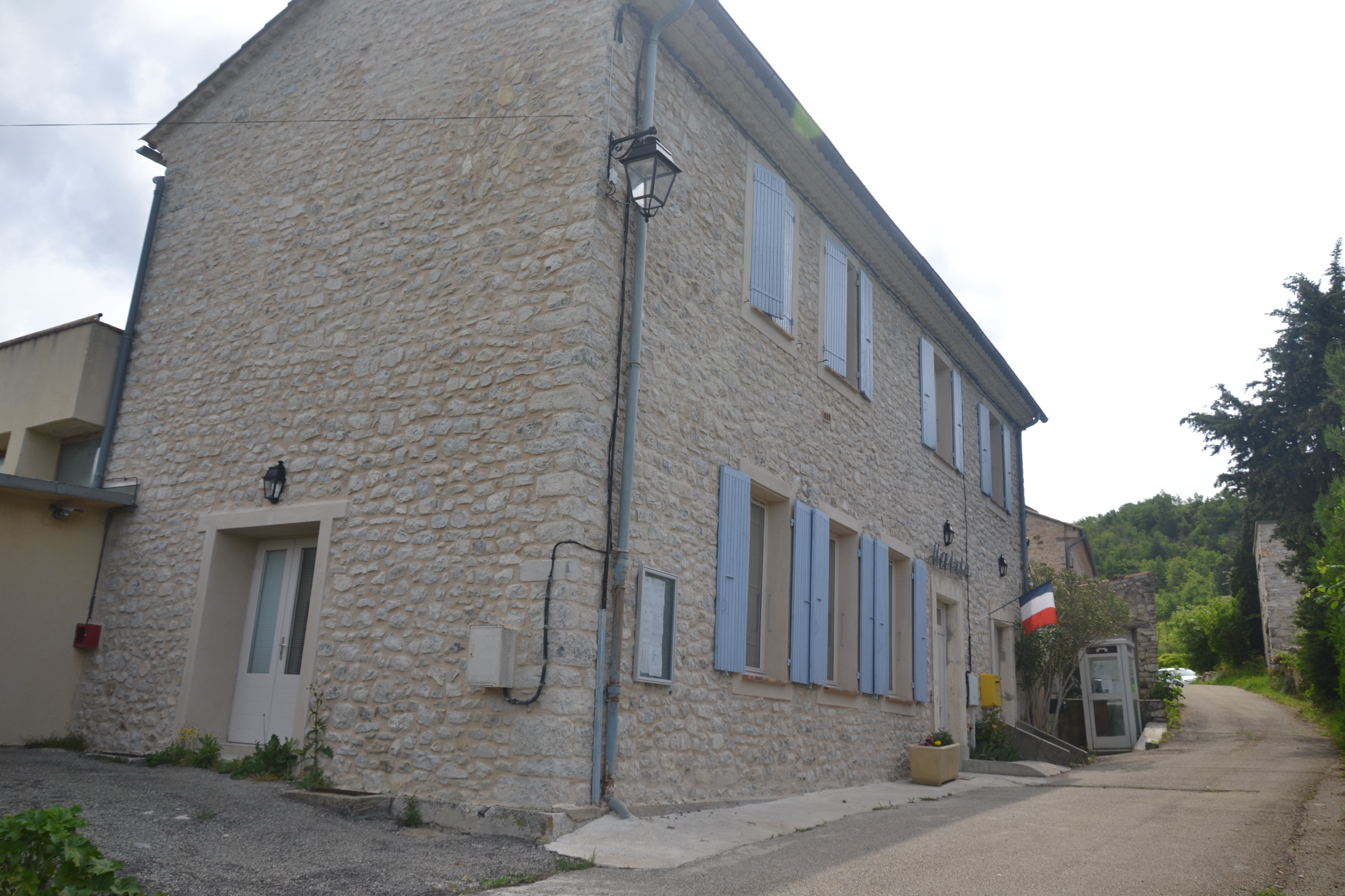 Mairie de Bésignan